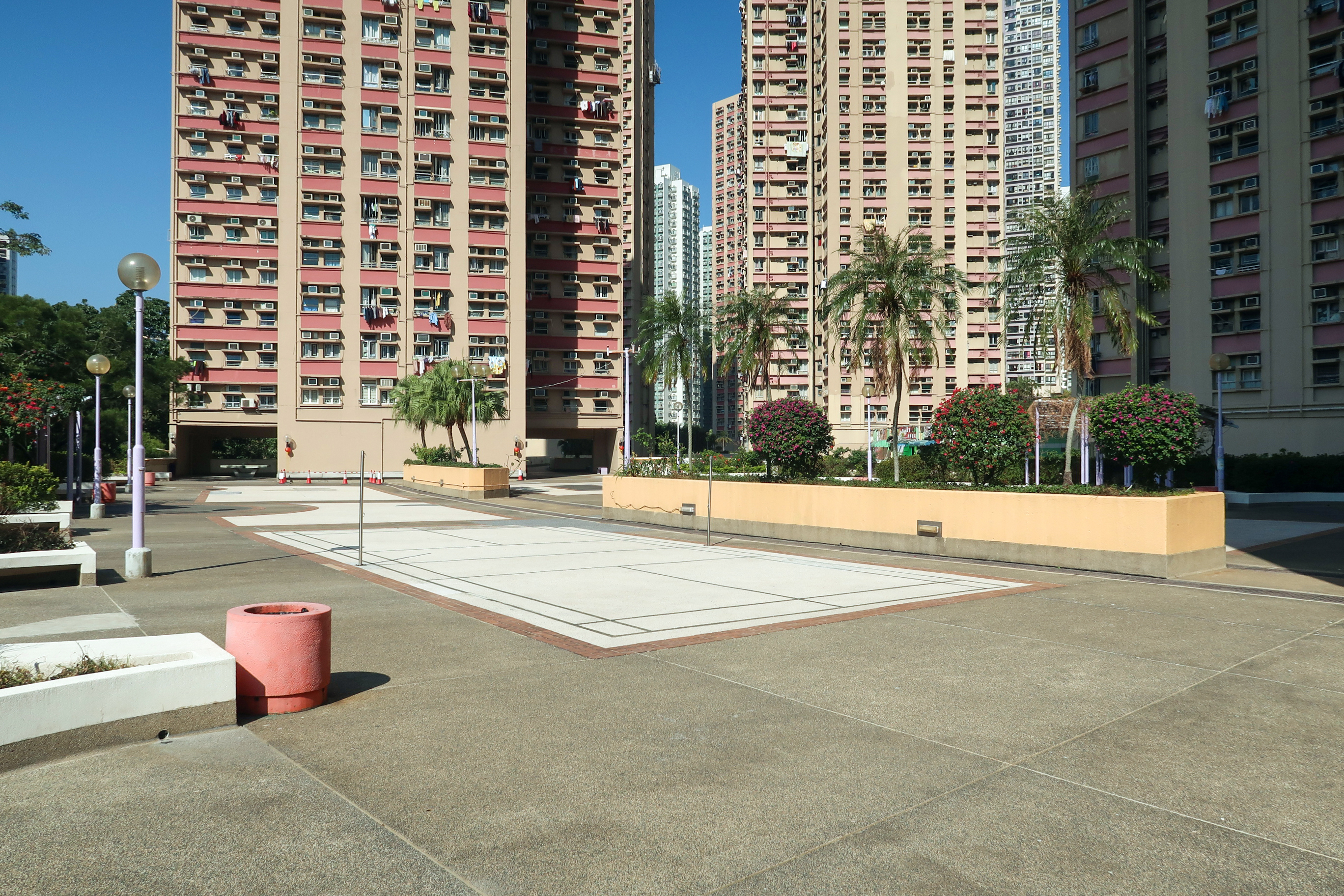 Yue Tin Court Podium Garden